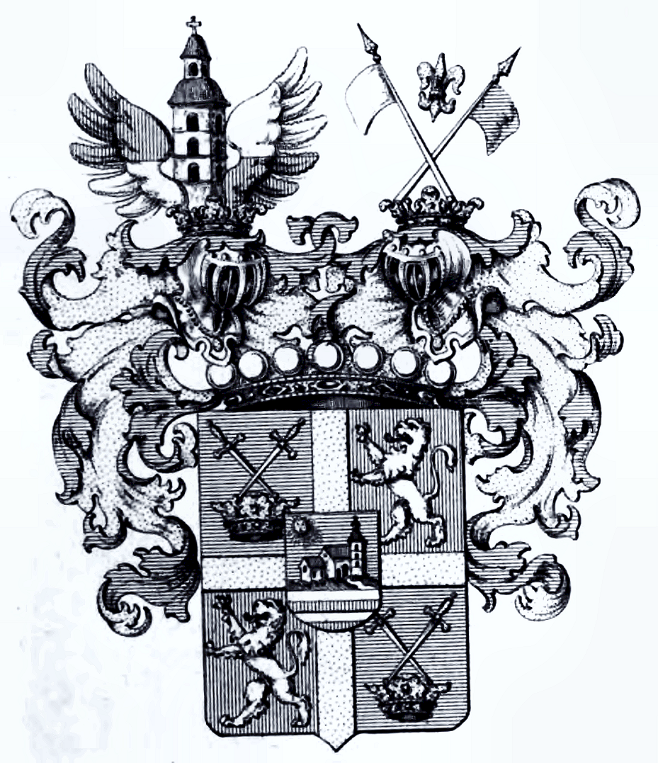 Wappen der Freiherren von Kirchbach auf Lauterbach seit 1720